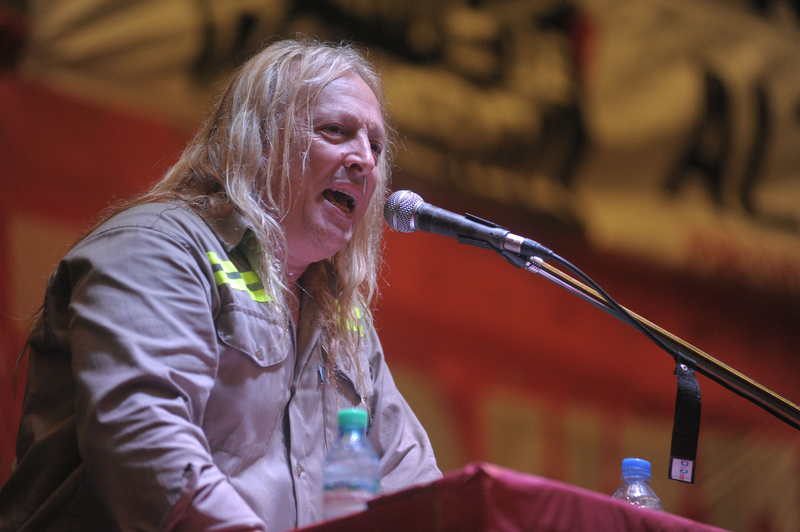 Rubén Sobrero habla en al acto del Frente de Izquierda realizando en el Club Ferro Carril Oeste el 8 de junio de 2015.